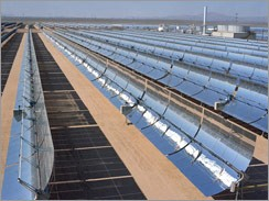 Solar Array récupéré de initialement chargé par User:Rock nj